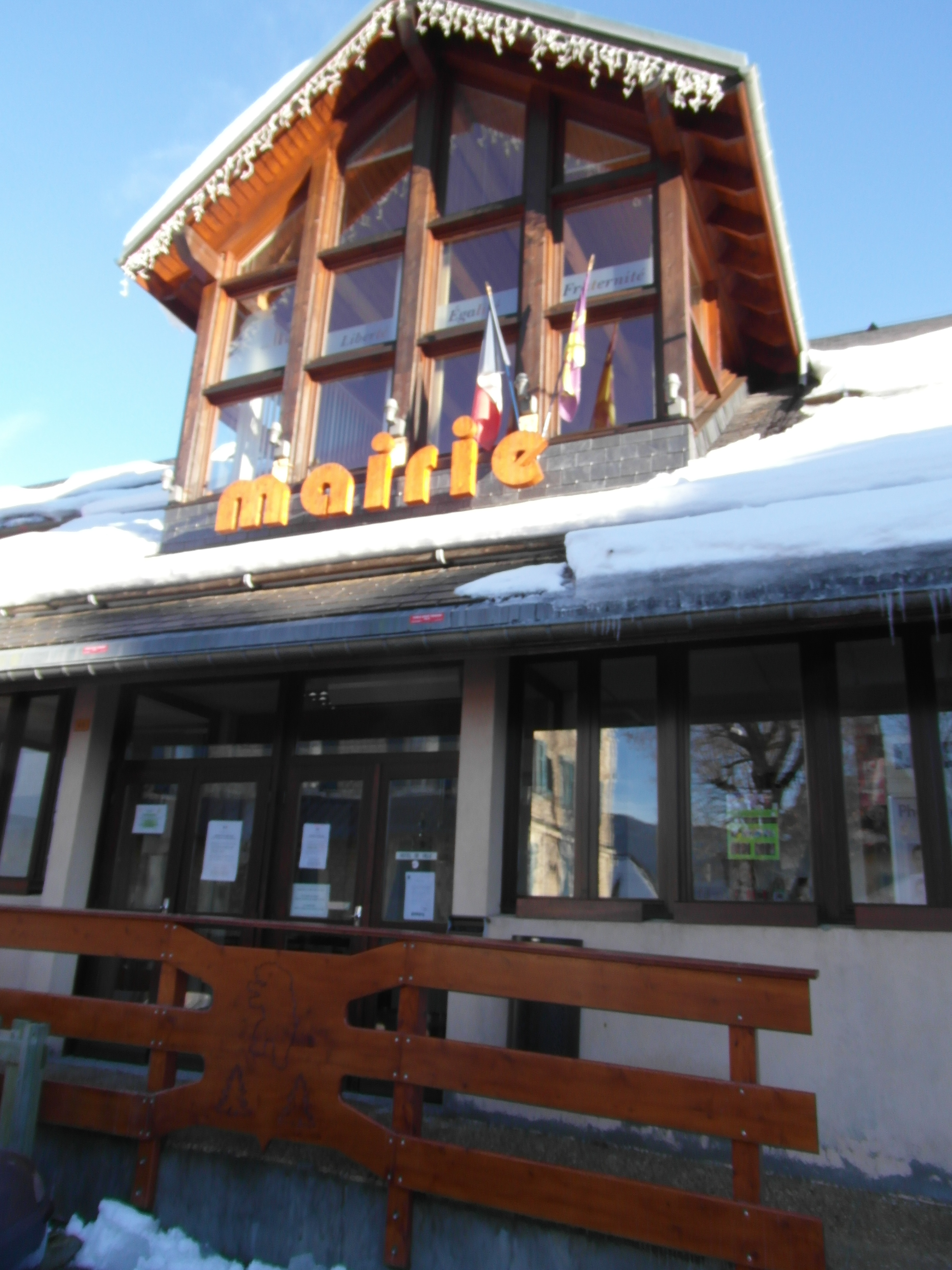 entrée de la mairie en hiver